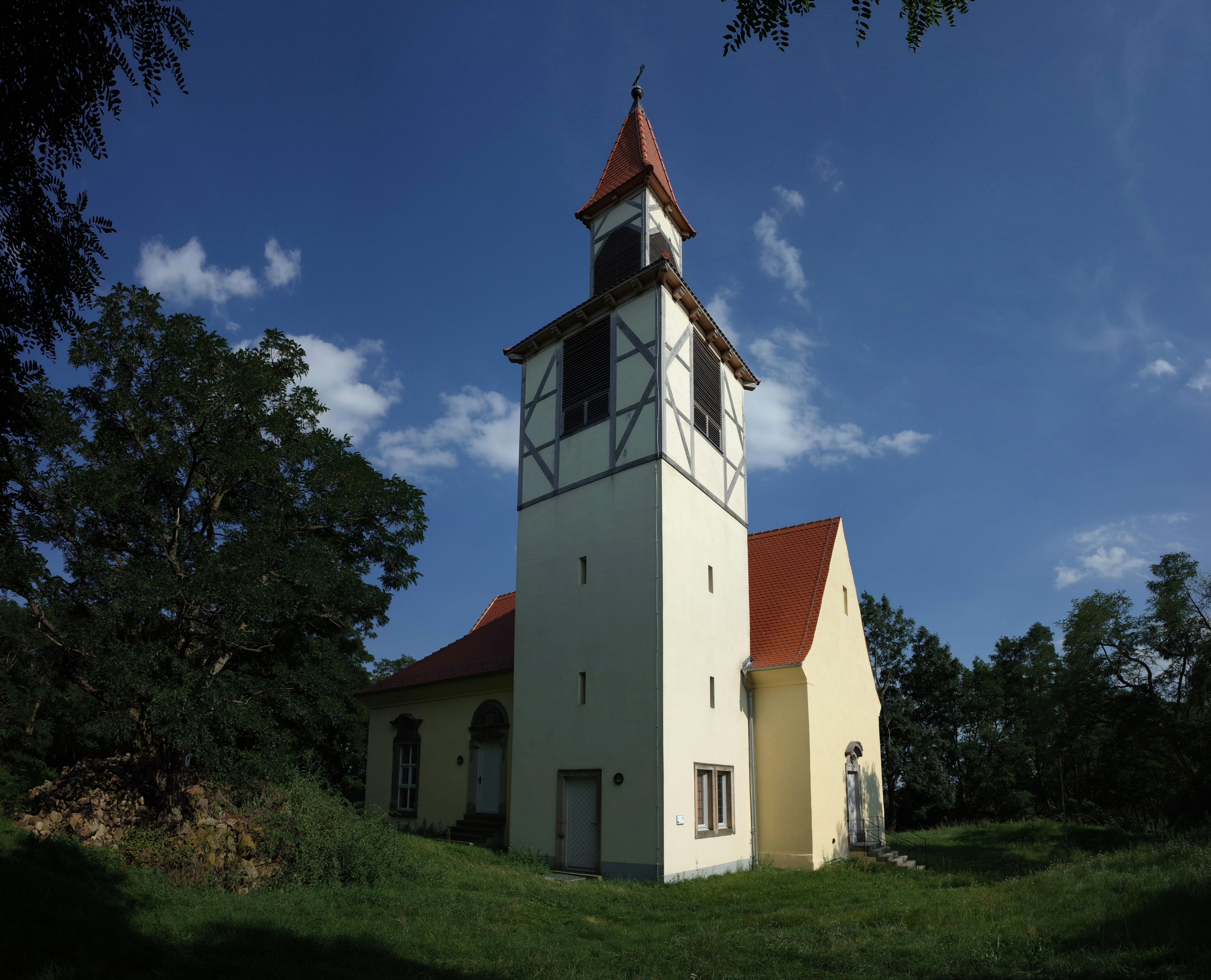 Gommern, Ortsteil Menz. Evangelische Kirche St. Paulus.